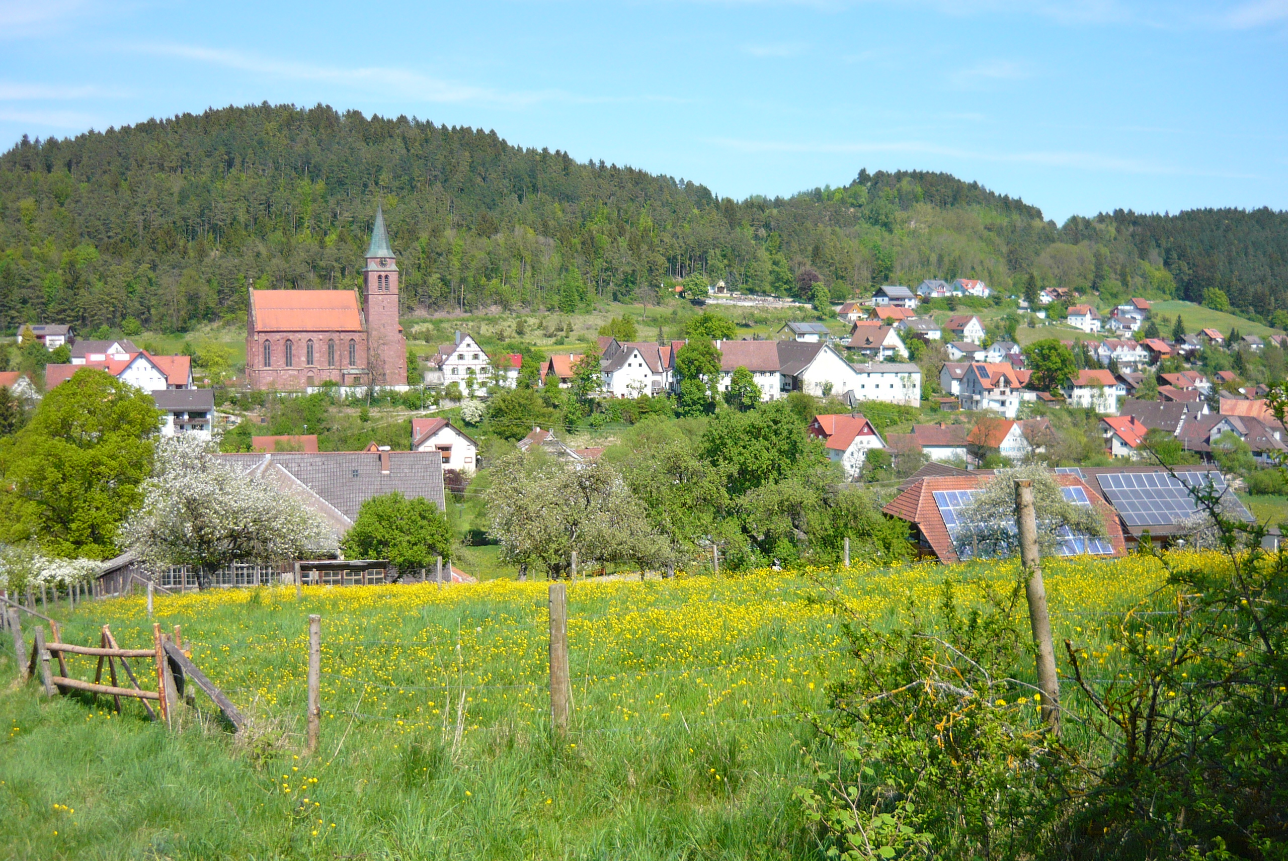 Horgen Panorama